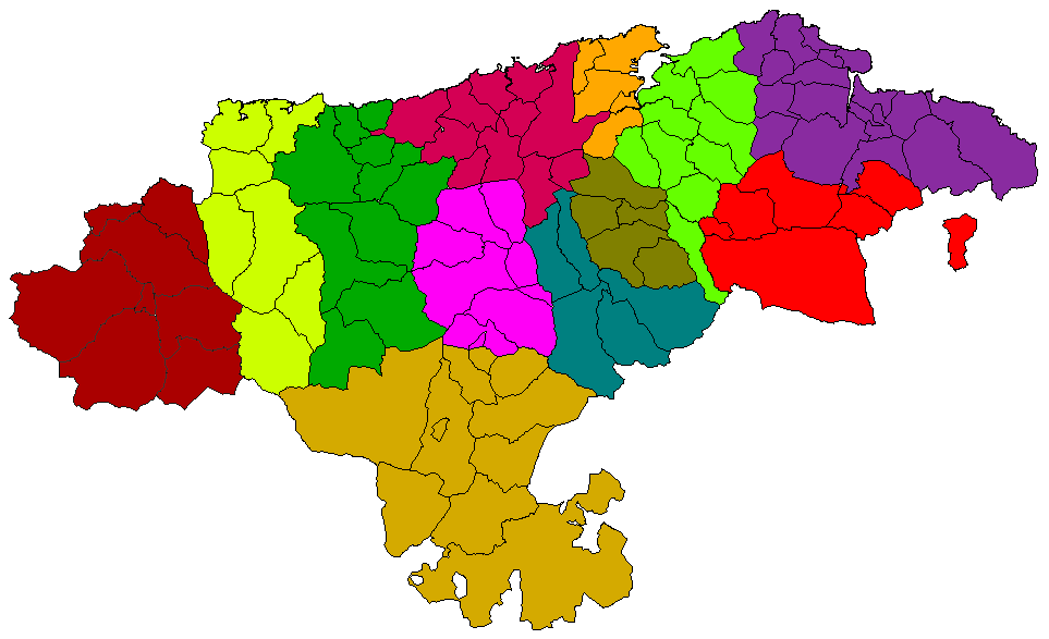 Comarcas ganaderas de Cantabria (España)